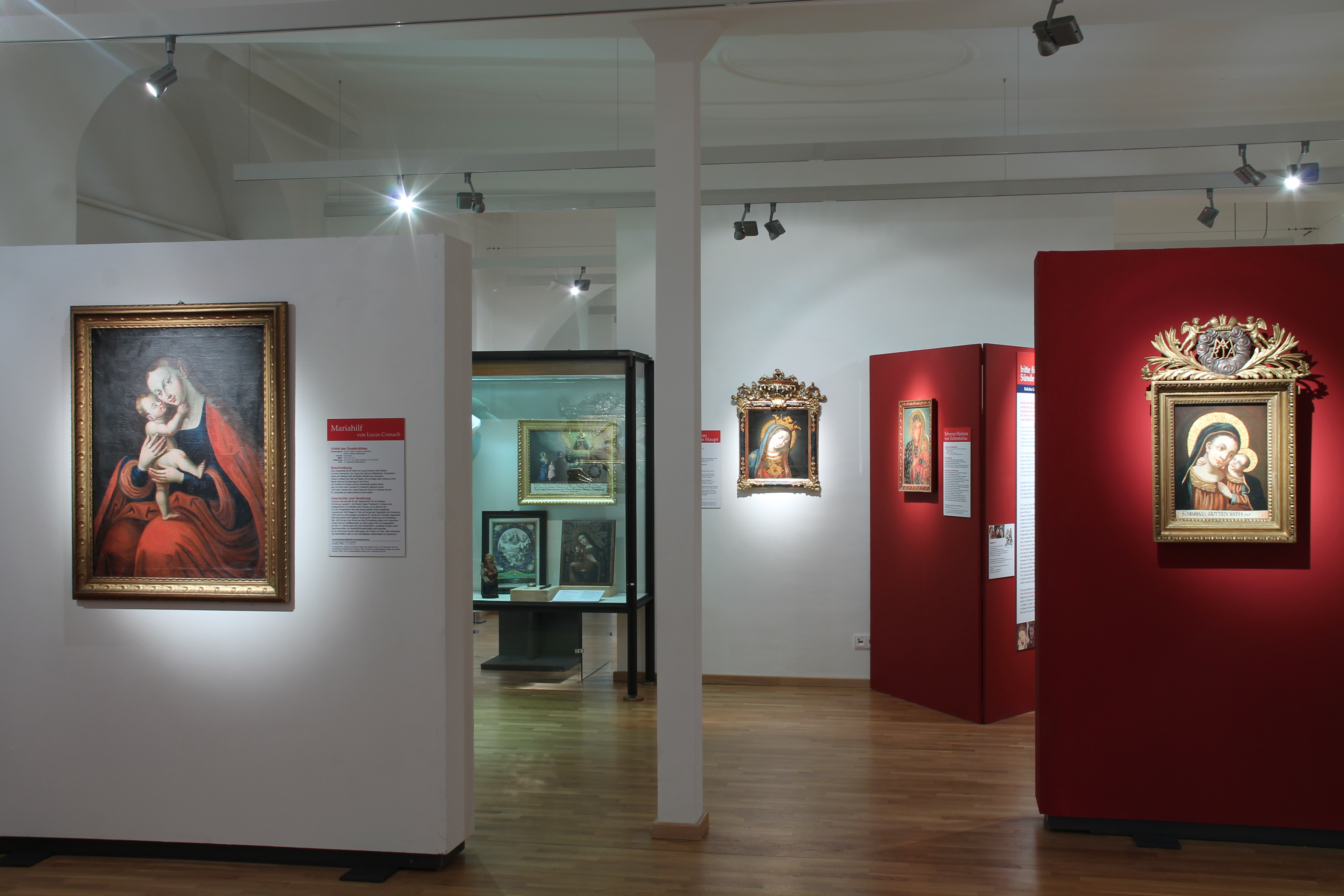 Blick in die aktuelle Sonderausstellung. Maria. 1001 Gesichter der Liebe